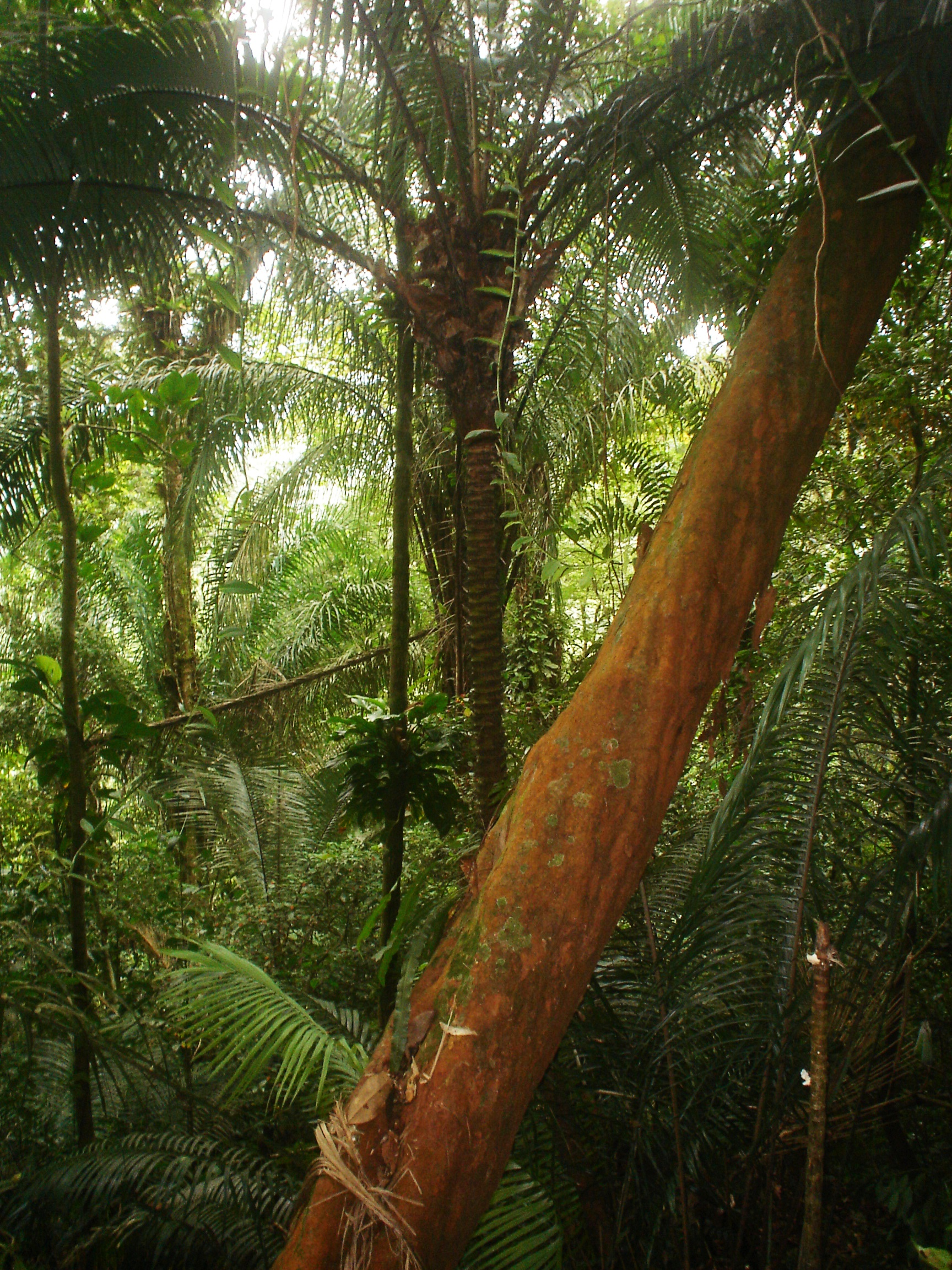 Foresta pluviale atlantica